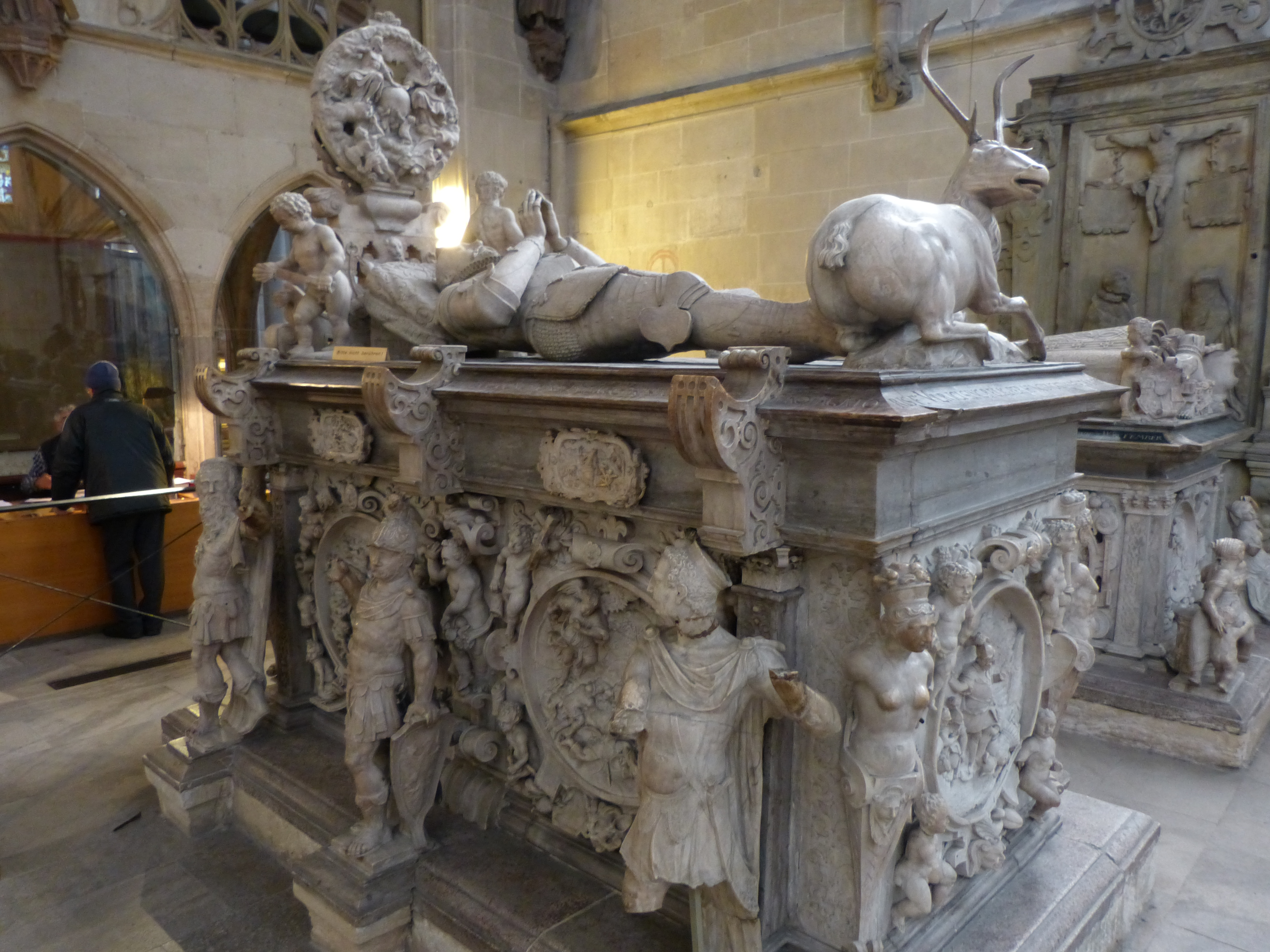 Grablege in der Stiftskirche von Tübingen, Baden-Württembergl